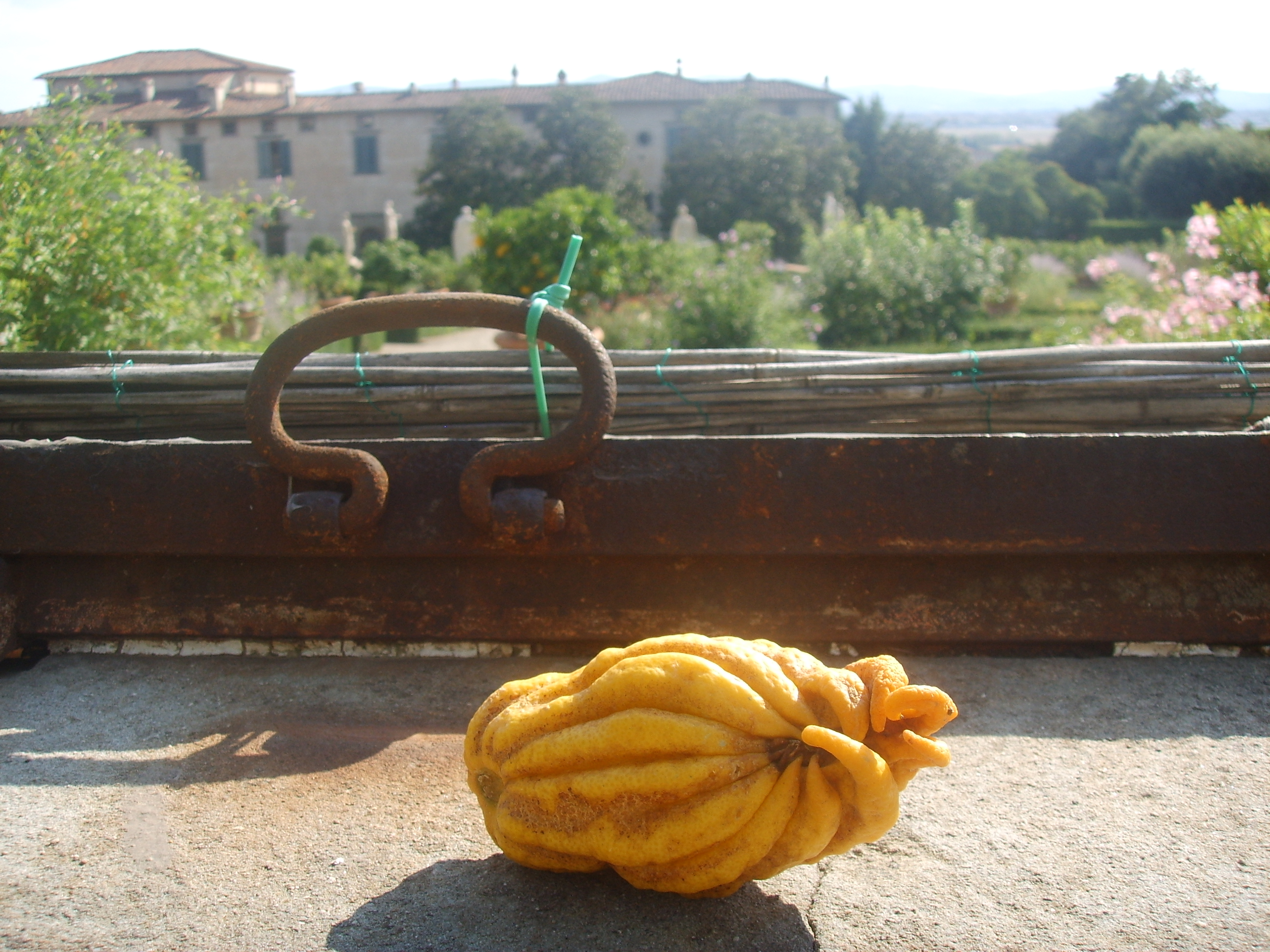 Parco di Villa Reale di Castello (Villa di Castello) in Florence Italy